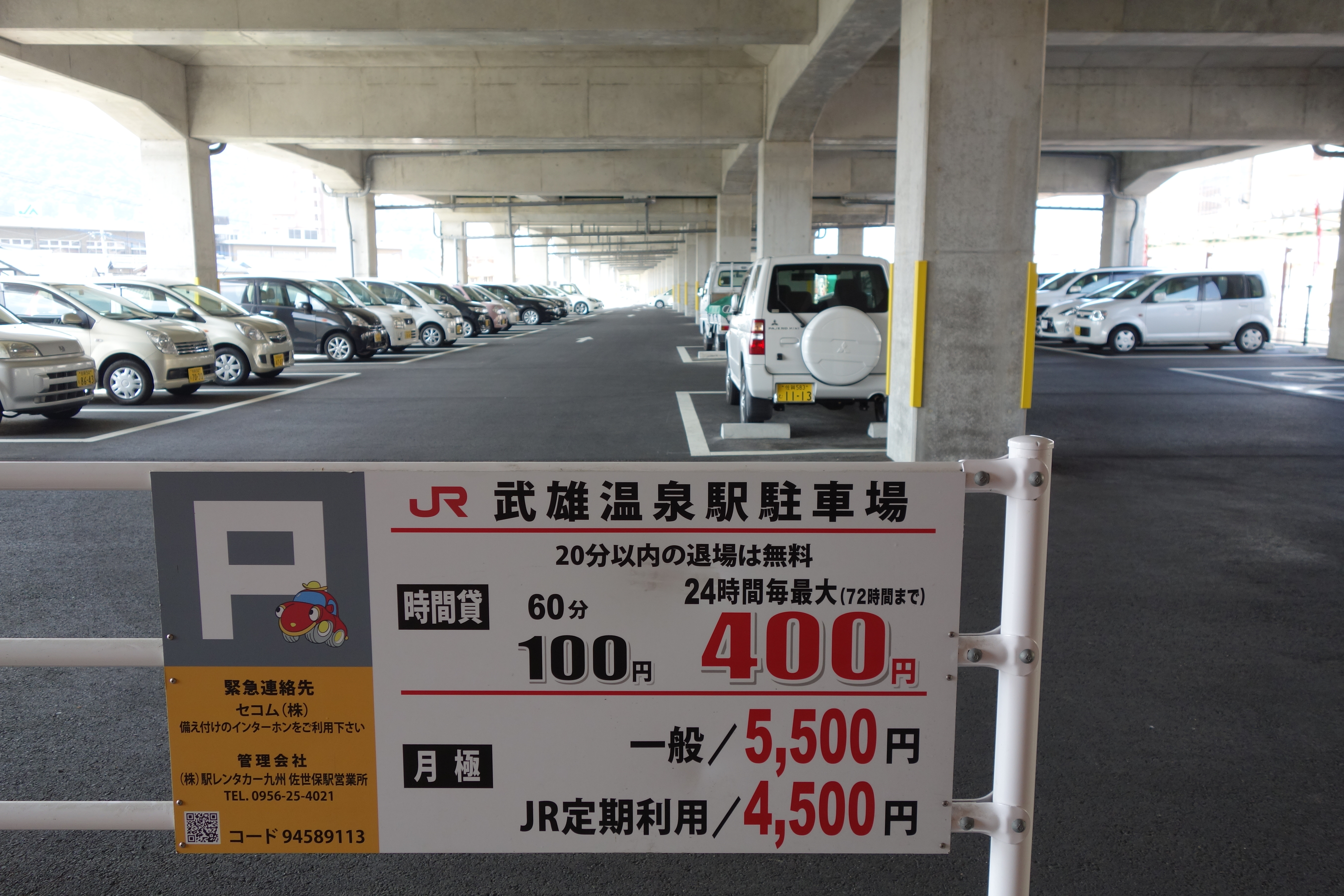 JR九州 武雄温泉駅駐車場